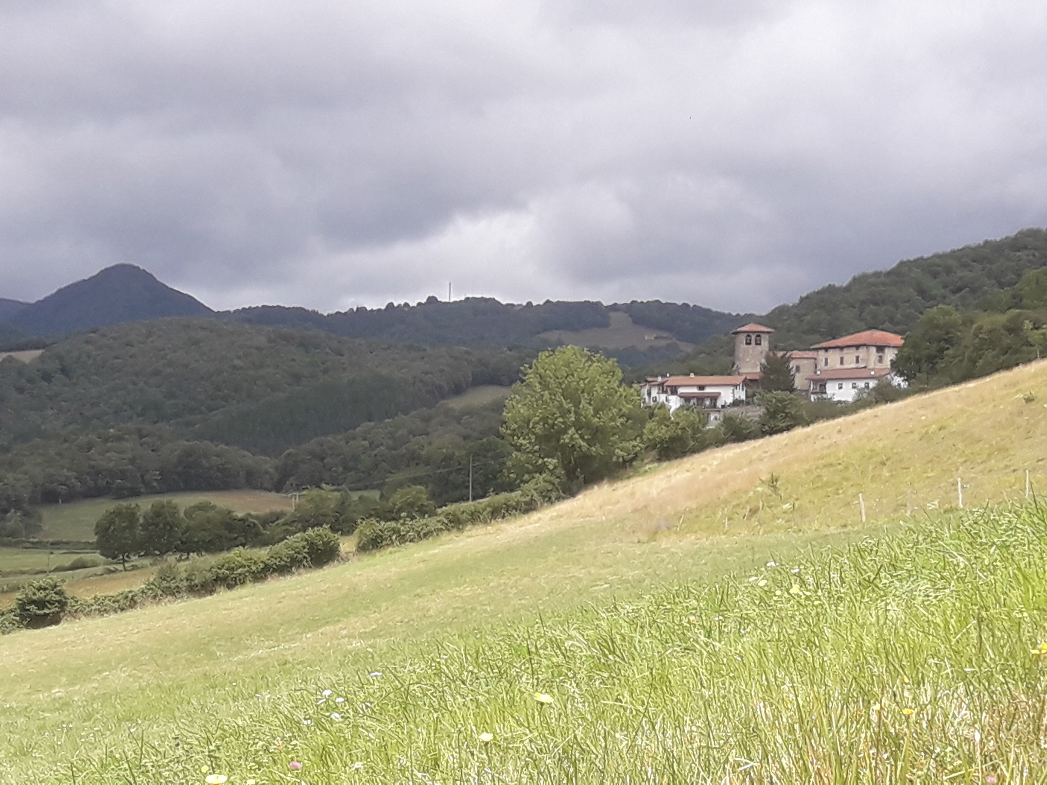 Ihaben vist del sud.